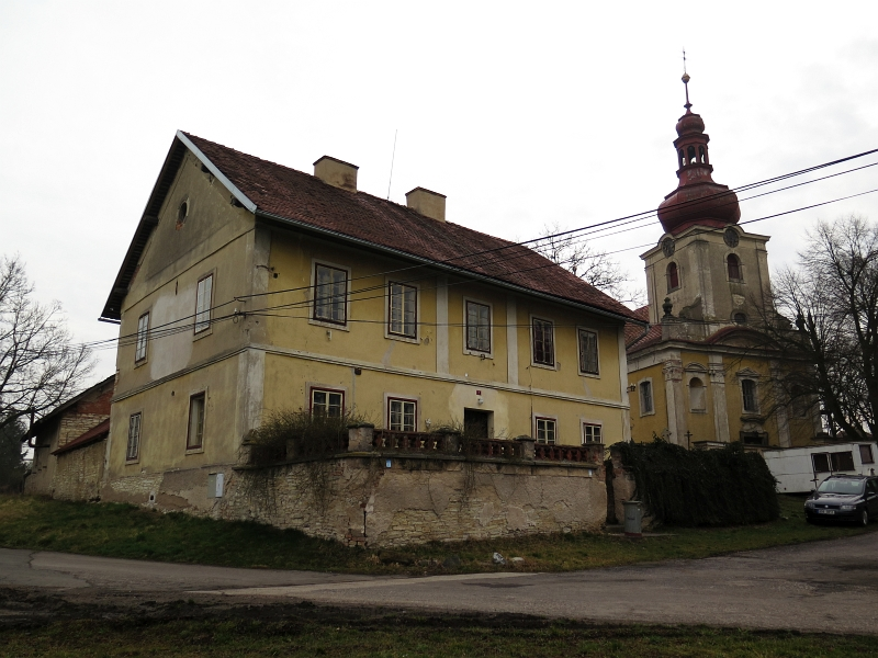 Fara, Žehuň 1, Žehuň.